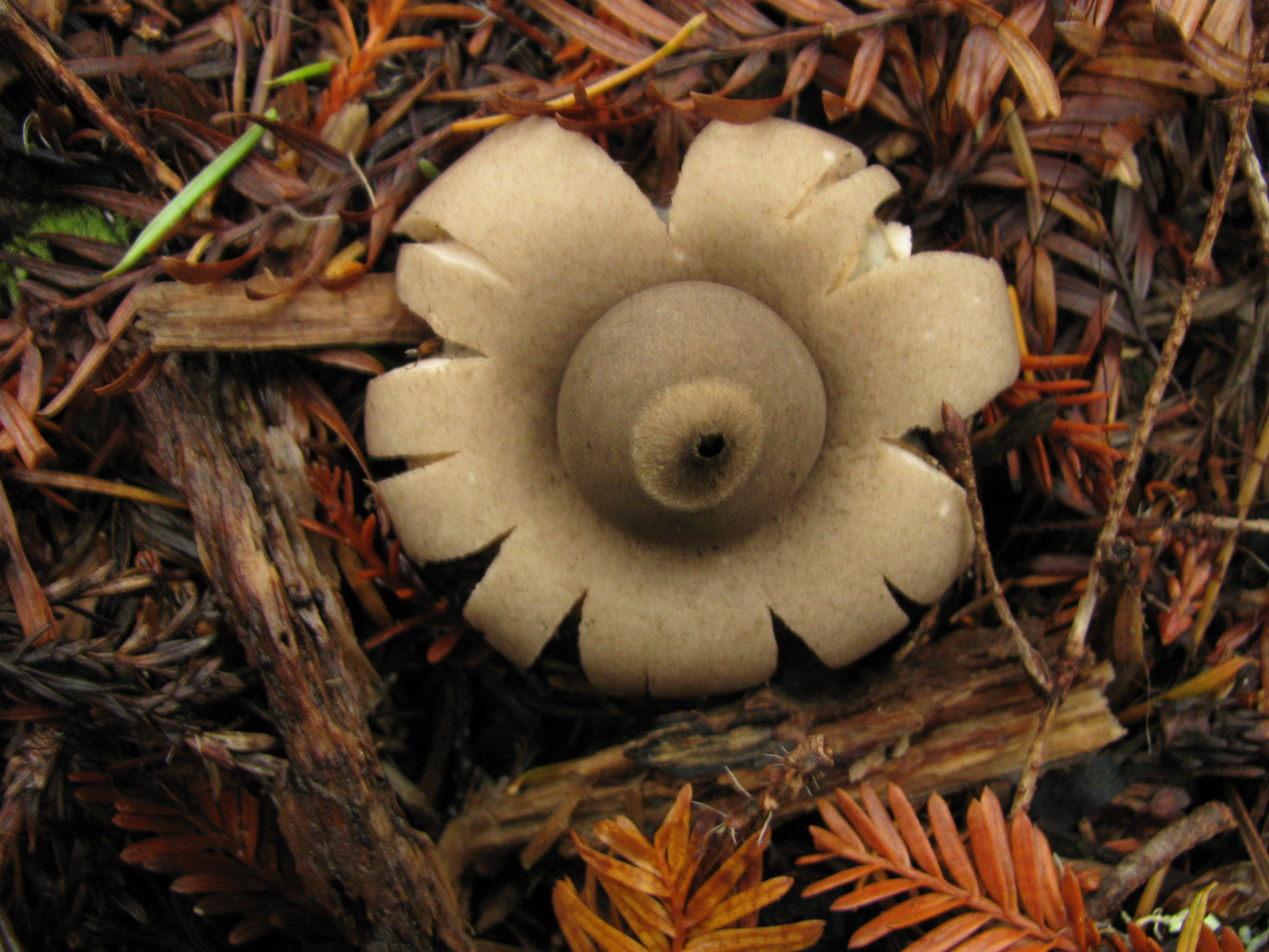 Geastrum saccatum (Fr.) Location: Mendocino, Mendocino Co., California, USA